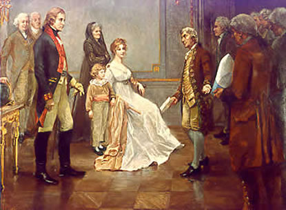 Friedrich Wilhelm III. empfängt Achard (König Friedrich Wilhelm III. empfängt Franz Carl Achard, der ihm den ersten Zuckerhut aus Rübenzucker überreicht – eine fiktive Begebenheit; eine solche Audienz fand nicht statt)